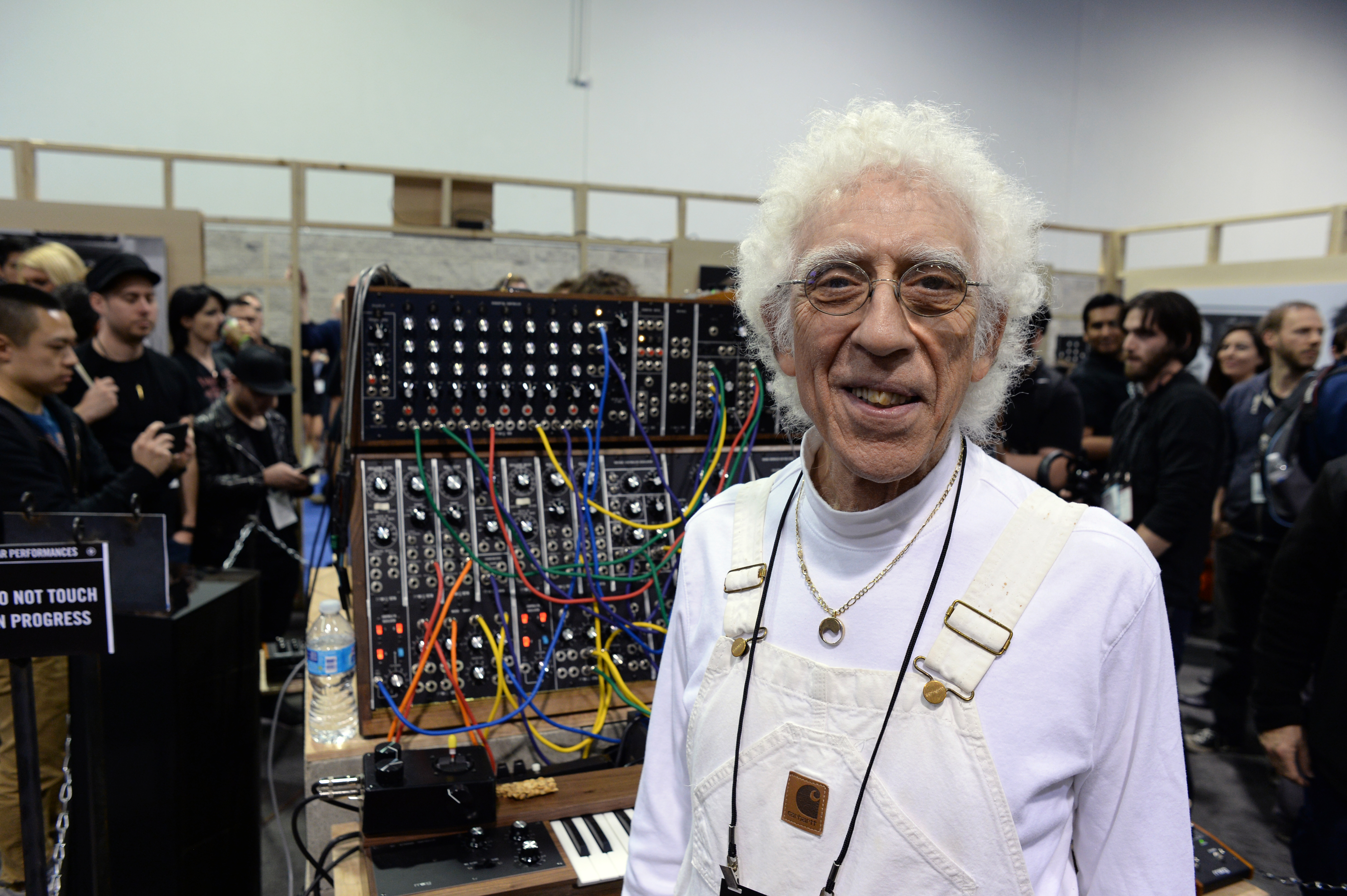 Malcolm Cecil